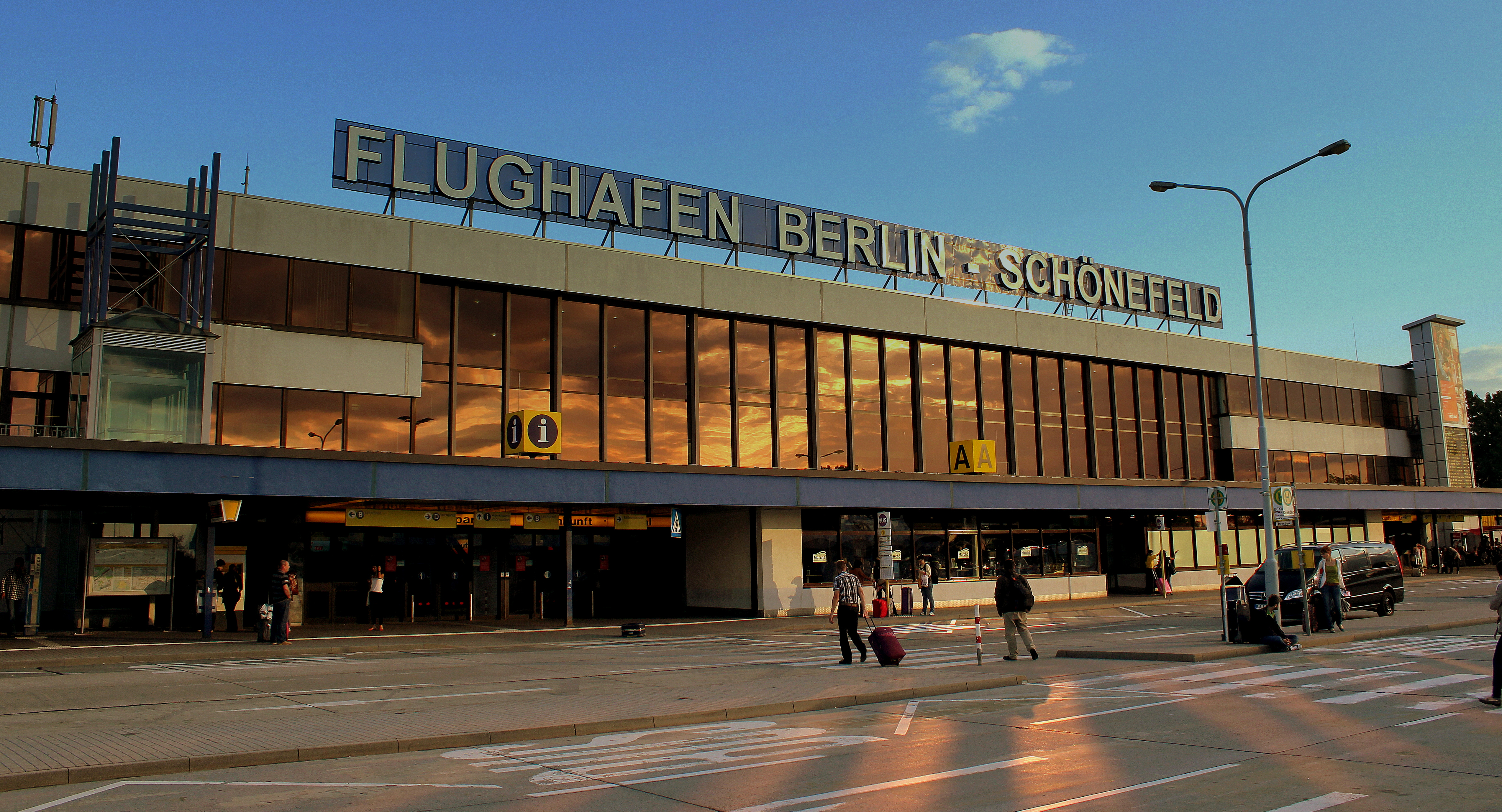 FLUGHAFEN SCHONEFELD BERLIN GERMANY JUNE 2013